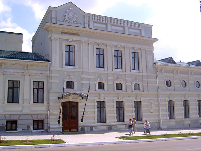 Будівля, де розміщувався Українсьткий Народний Будинок. Херсон